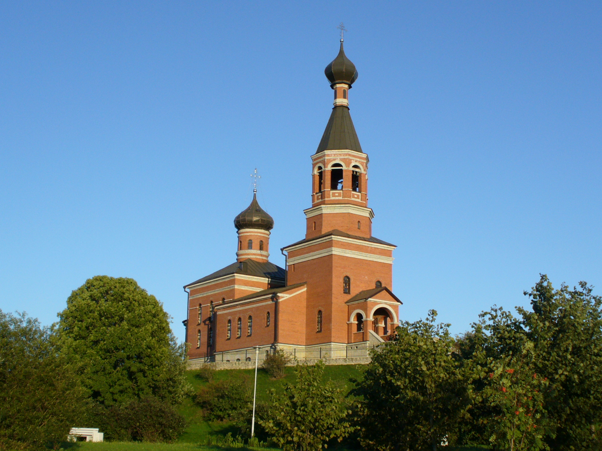 Maardu Peaingel Miikaeli kirik. Maardu, Harju county, Estonia.